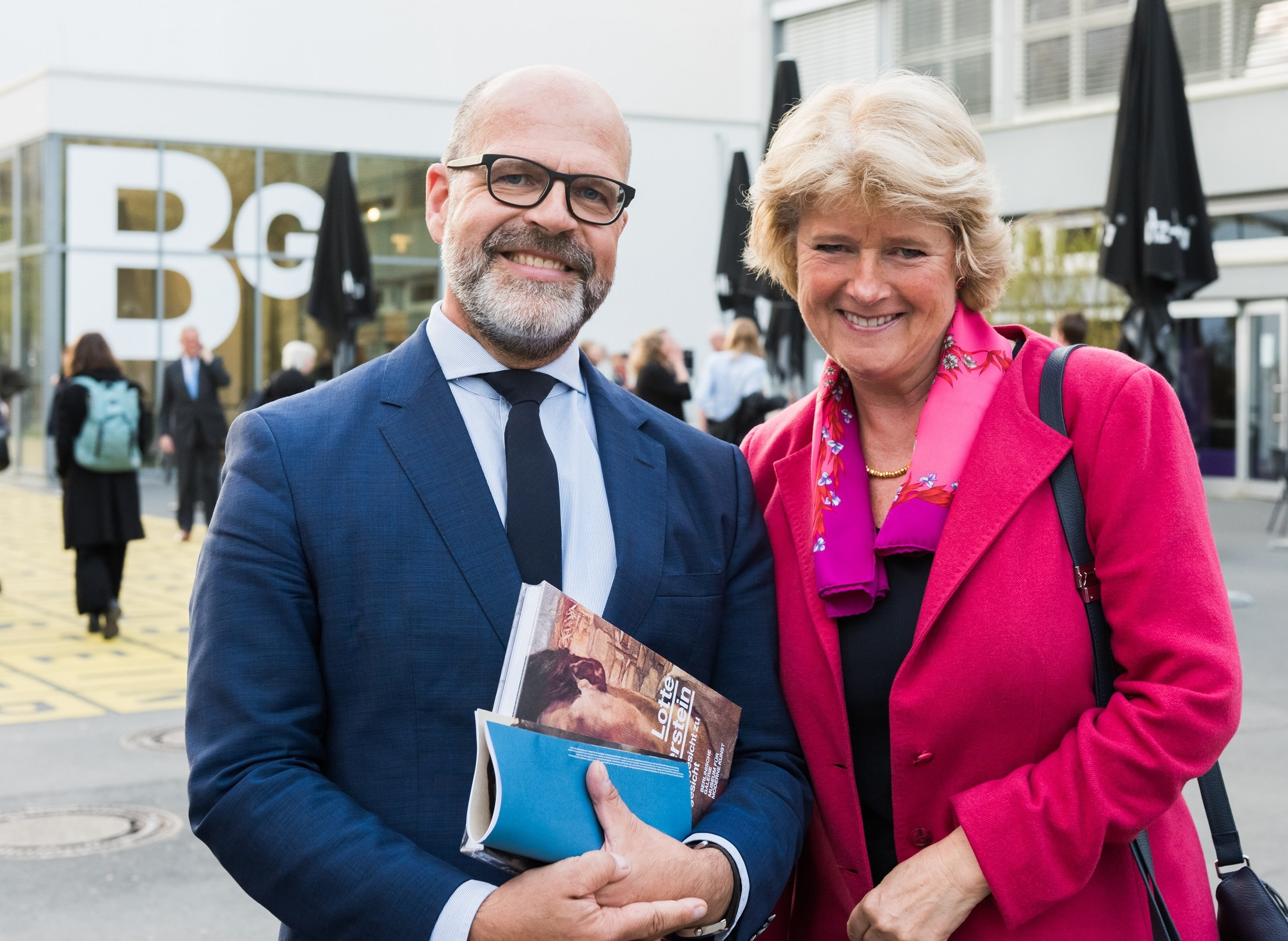 Thomas Köhler trifft Monika Grütters zur Lotte Laserstein Eröffnung am 4. Apr 19 - Foto: Harry Schnitger